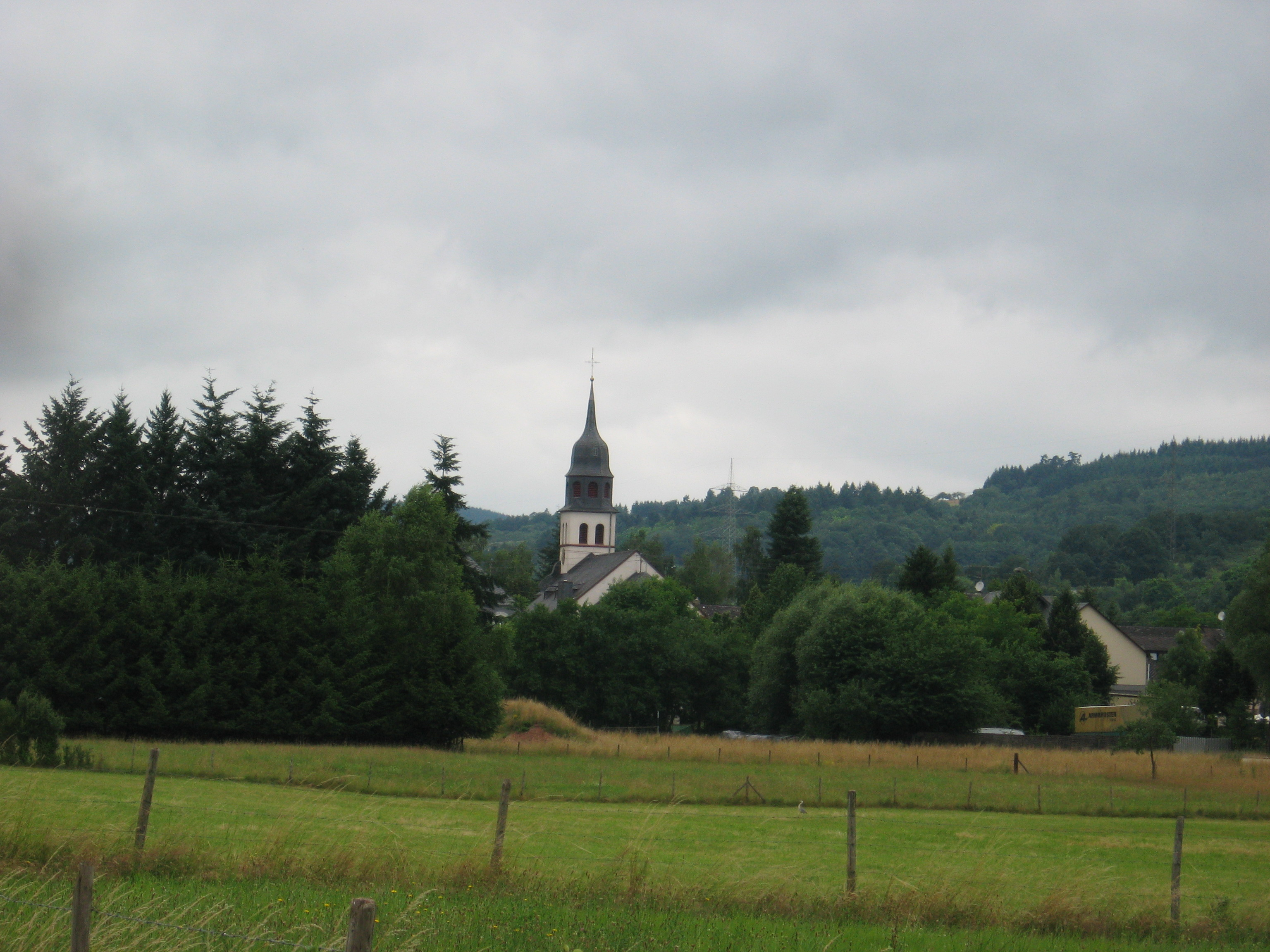 Inglesia de Reyes Magos en Kinderbeuern